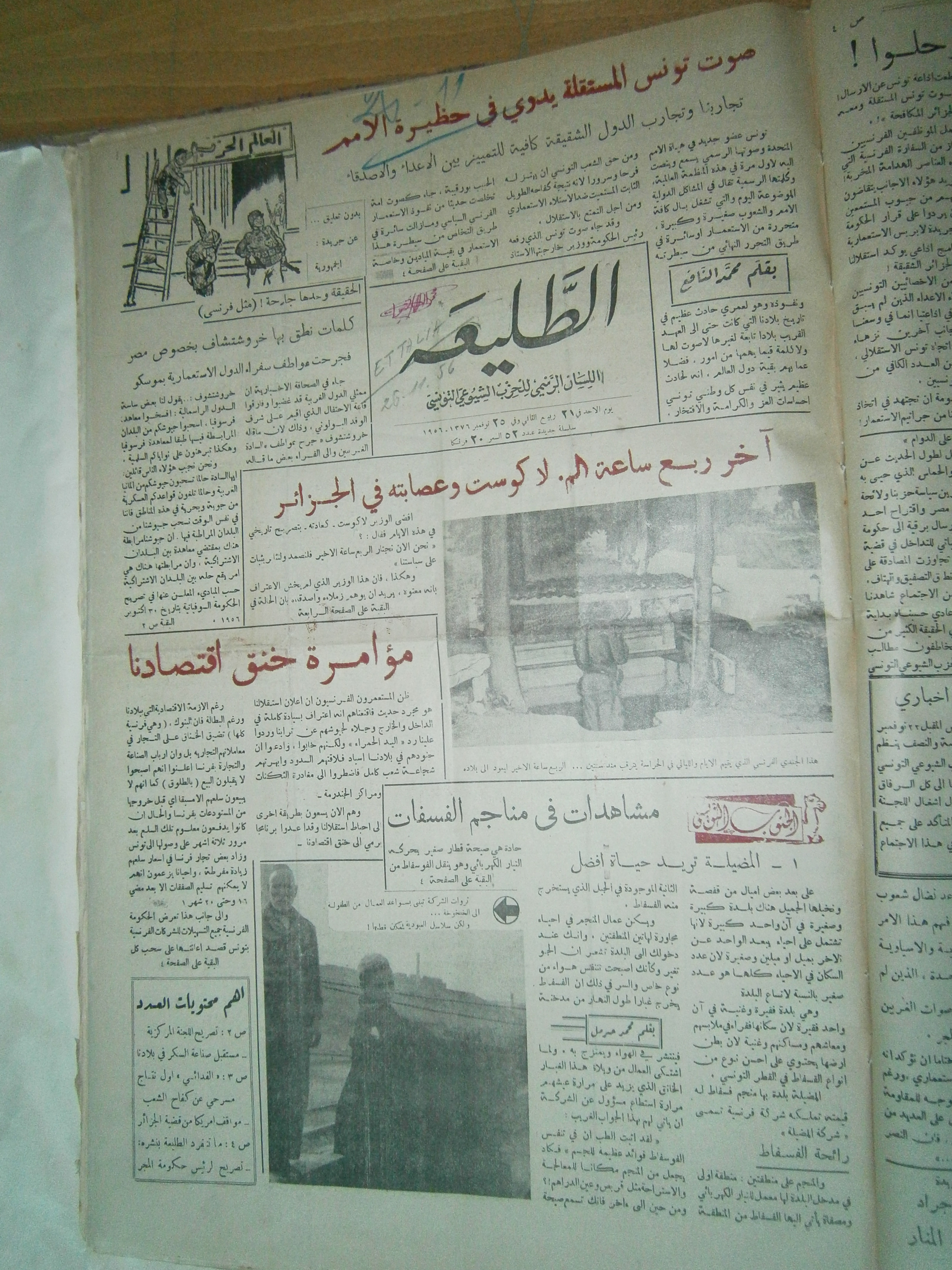 صورة من جريدة الطليعة التونسية سنة 1956